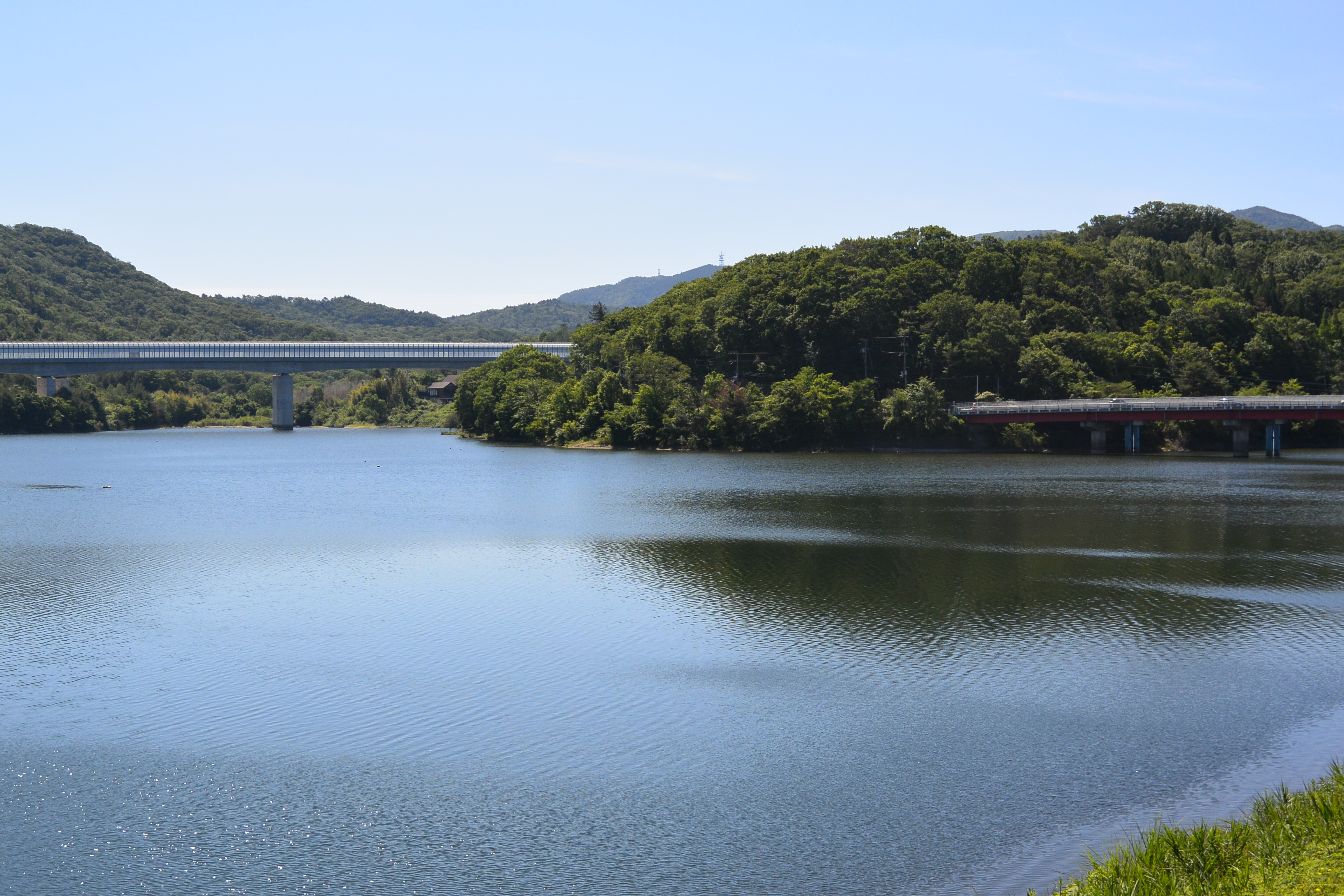 兵庫県西宮市の金仙寺湖、丸山ダムによってできたダム湖で丸山貯水池とも呼ばれる。 Nikon 1 AW1 + 1 Nikkor AW 11-27.5mm f/3.5-5.6